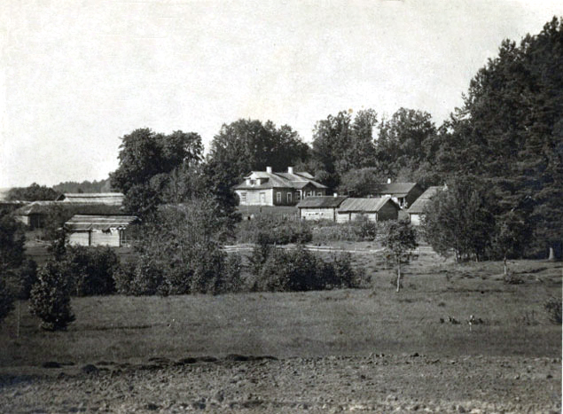 Усадьба Хруцких. Захарничи, Полоцкого уезда, Витебской губернии. Фотография 1910-х гг. (фонды НПИКМЗ, Полоцк)